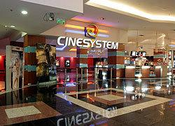 Vista da fachada do Cinesystem de São Leopoldo, RS